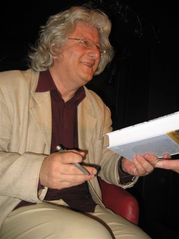 Péter Esterházy (b. 1950), Hungarian writer